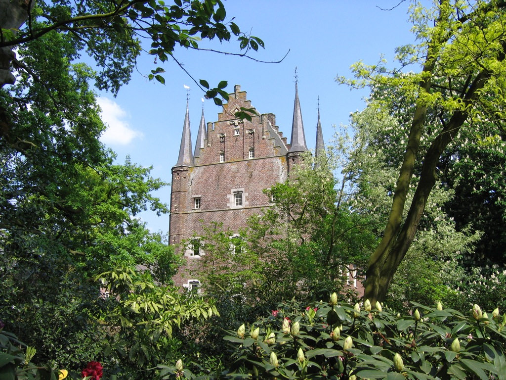 Het kasteel van gemert. Foto gemaakt door Wieger van der Burgt